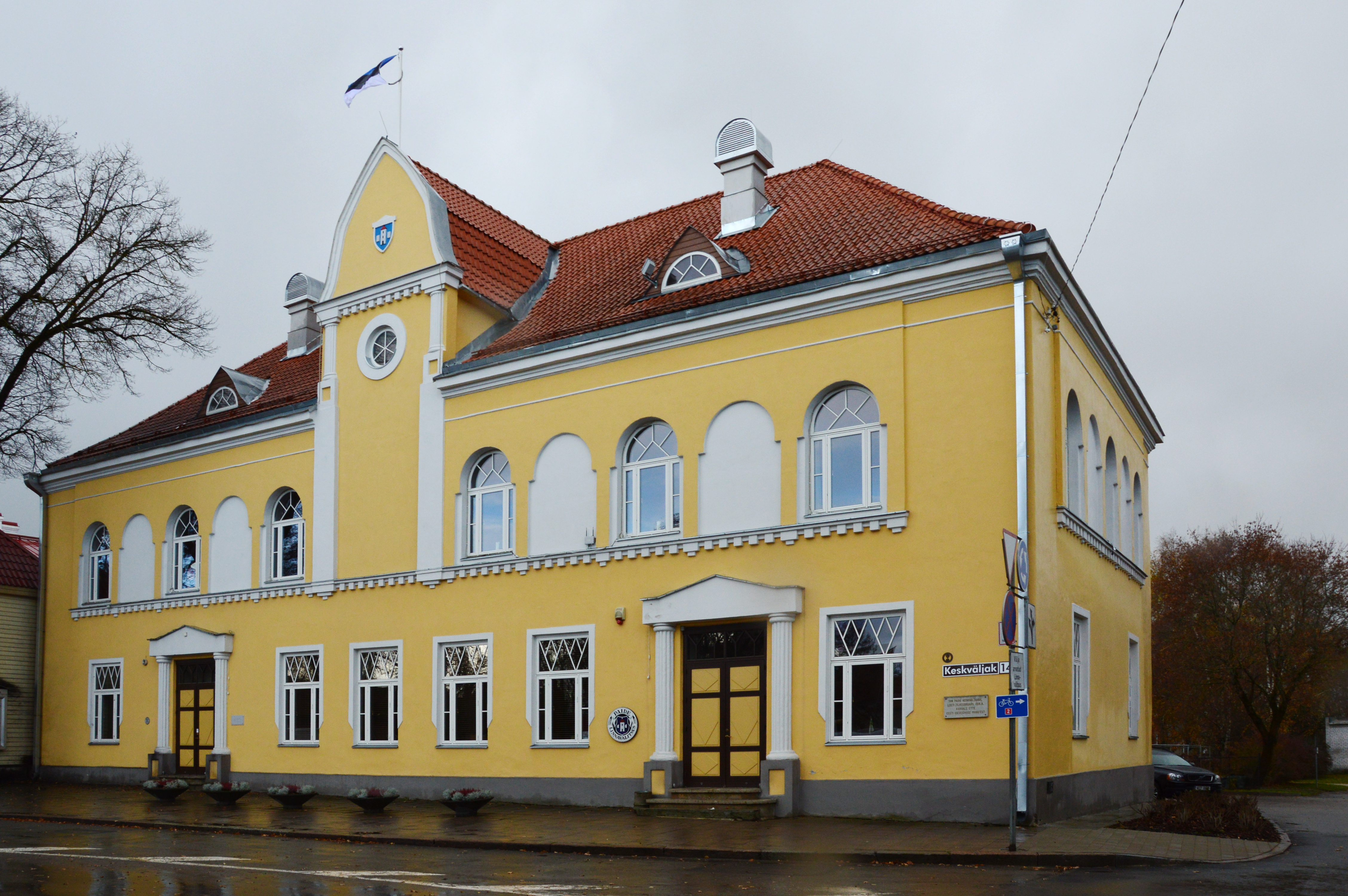 Paide raehoone